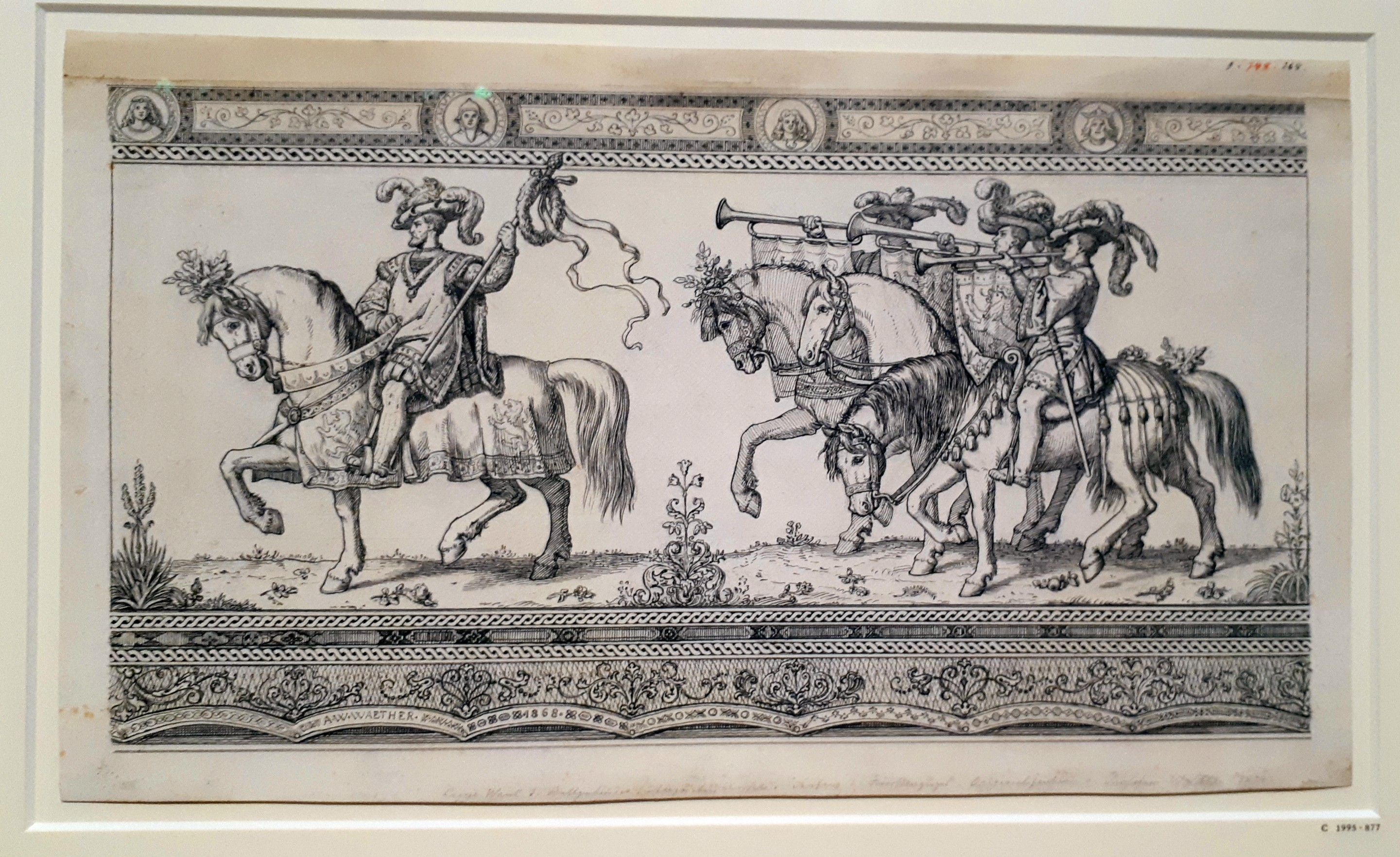 Wilhelm Walther: Die ersten vier Reiter (Marschall und Fanfarenbläser) des Fürstenzuges an der langen Wand des Stallhofes auf der Augustusstraße in Dresden. Blindgriffelritzung, Bleistift, Feder in Schwarz auf Papier. 1868